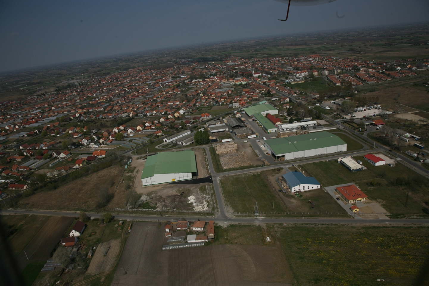 Mórahalom Ipari Park Légifelvétel